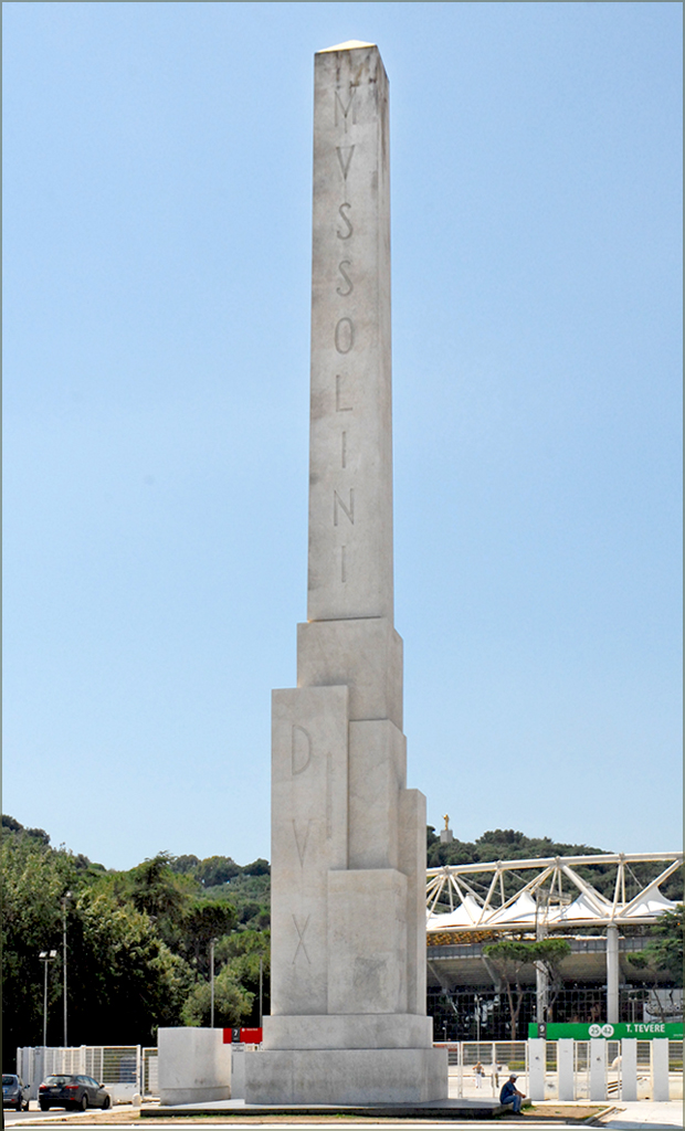 L'obélisque à Mussolini ____________ Le Foro Italico, appelé dans les années 30, Foro Mussolini, est un grand ensemble de bâtiments et d'équipements sportifs. Sa construction a débuté à l'époque fasciste sous la direction de l'architecte Enrico Del Dubbio. Le Foro a été inauguré en 1932. A l'entrée, un obélisque en marbre dédié à Mussolini a été érigé. Le stade des marbres est l'équipement le plus célèbre avec ses 60 statues d'athlètes à l'antique, placées au-dessus des gradins et offertes par les villes et provinces d'Italie. A l'entrée, se trouvait l'Académie d"éducation physique, constituée de deux corps de bâtiments rouges, symétriques et reliés par une loggia. Les locaux sont occupés aujourd'hui par le comité olympique italien. A proximité, un stade olympique a été construit pour les jeux de 1960 puis agrandi pour la coupe du monde de 1990.